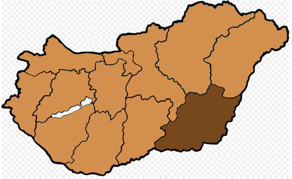 Mappa dell'arcidiocesi cattolica di Szeged-Csanad, in Ungheria. Lavoro personale eseguito da questa immagine di Commons.